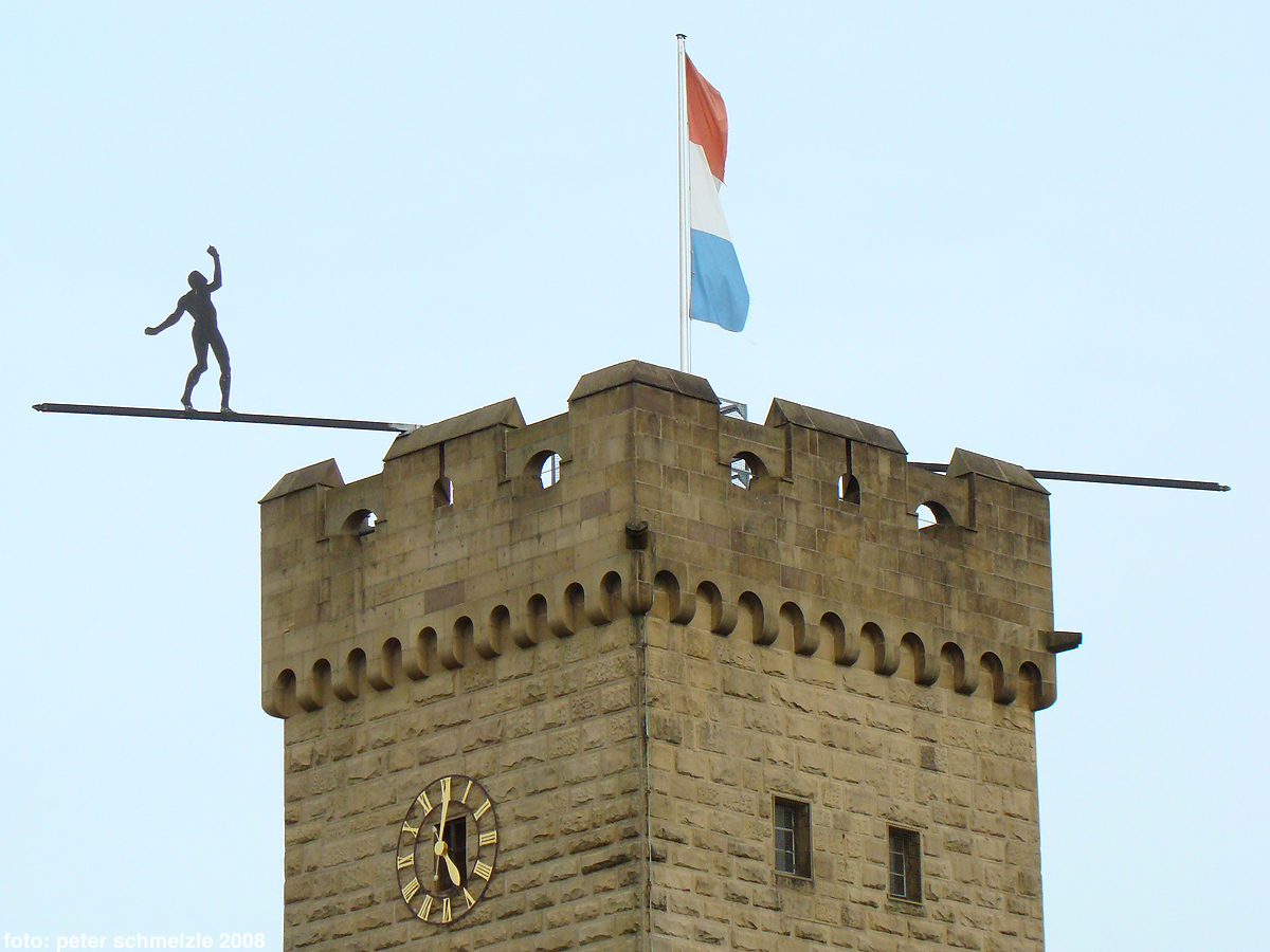 Skulptur "über dem Abgrund" von Hubertus von der Goltz auf dem Götzenturm in Heilbronn